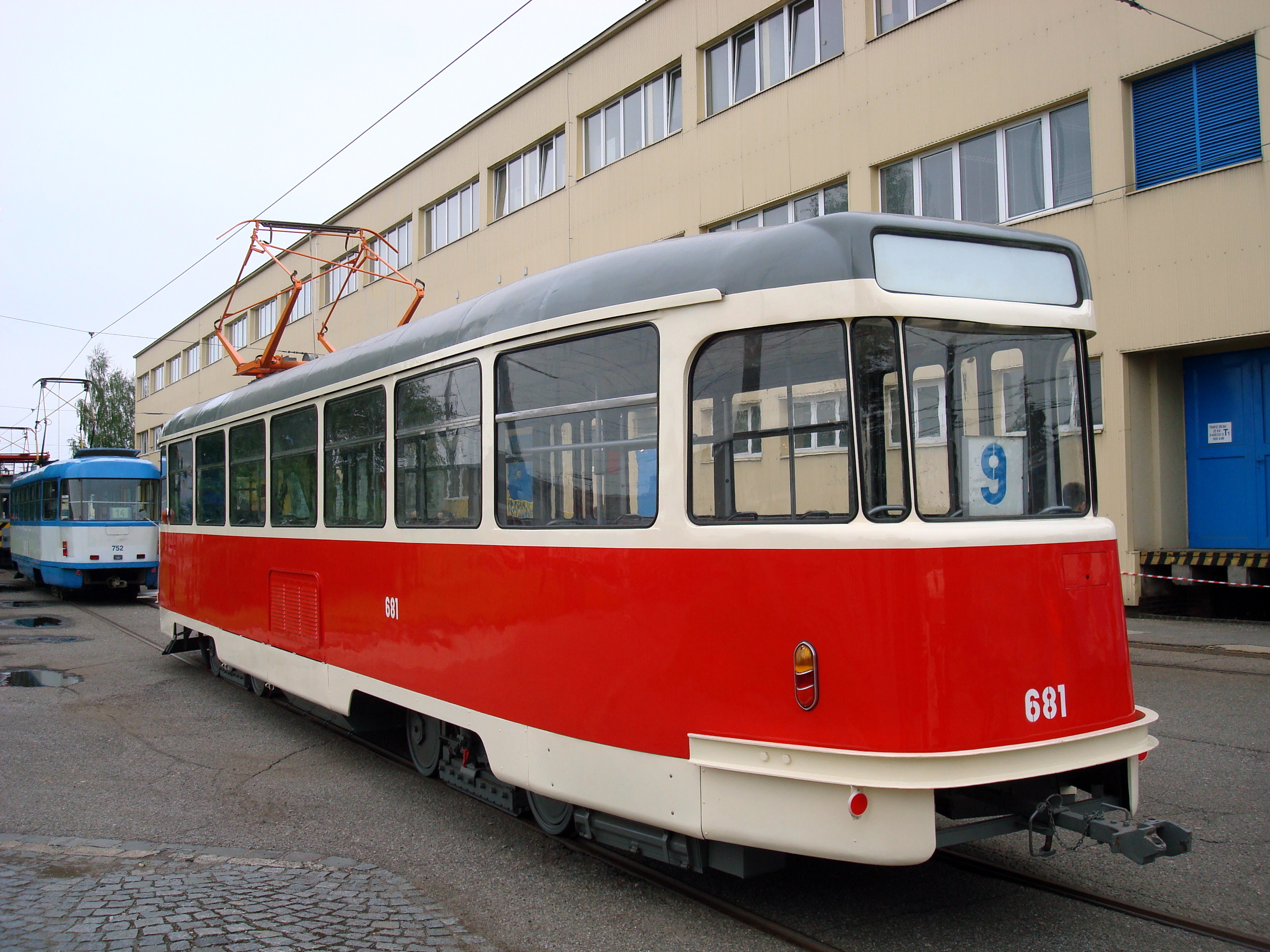 Ostravská muzejní noc 15.05.2010